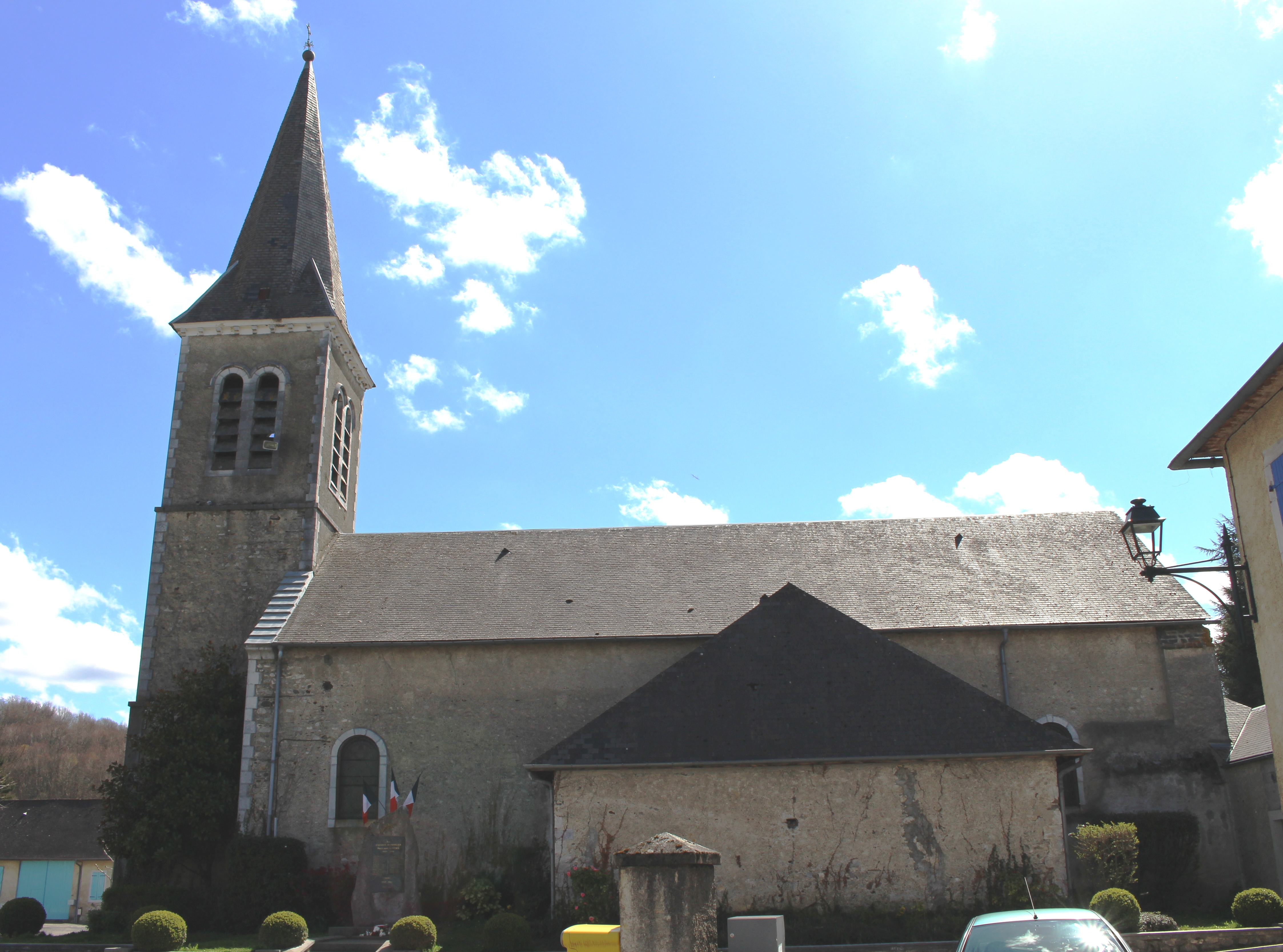 Église Saint-Georges d'Ordizan (Hautes-Pyrénées)